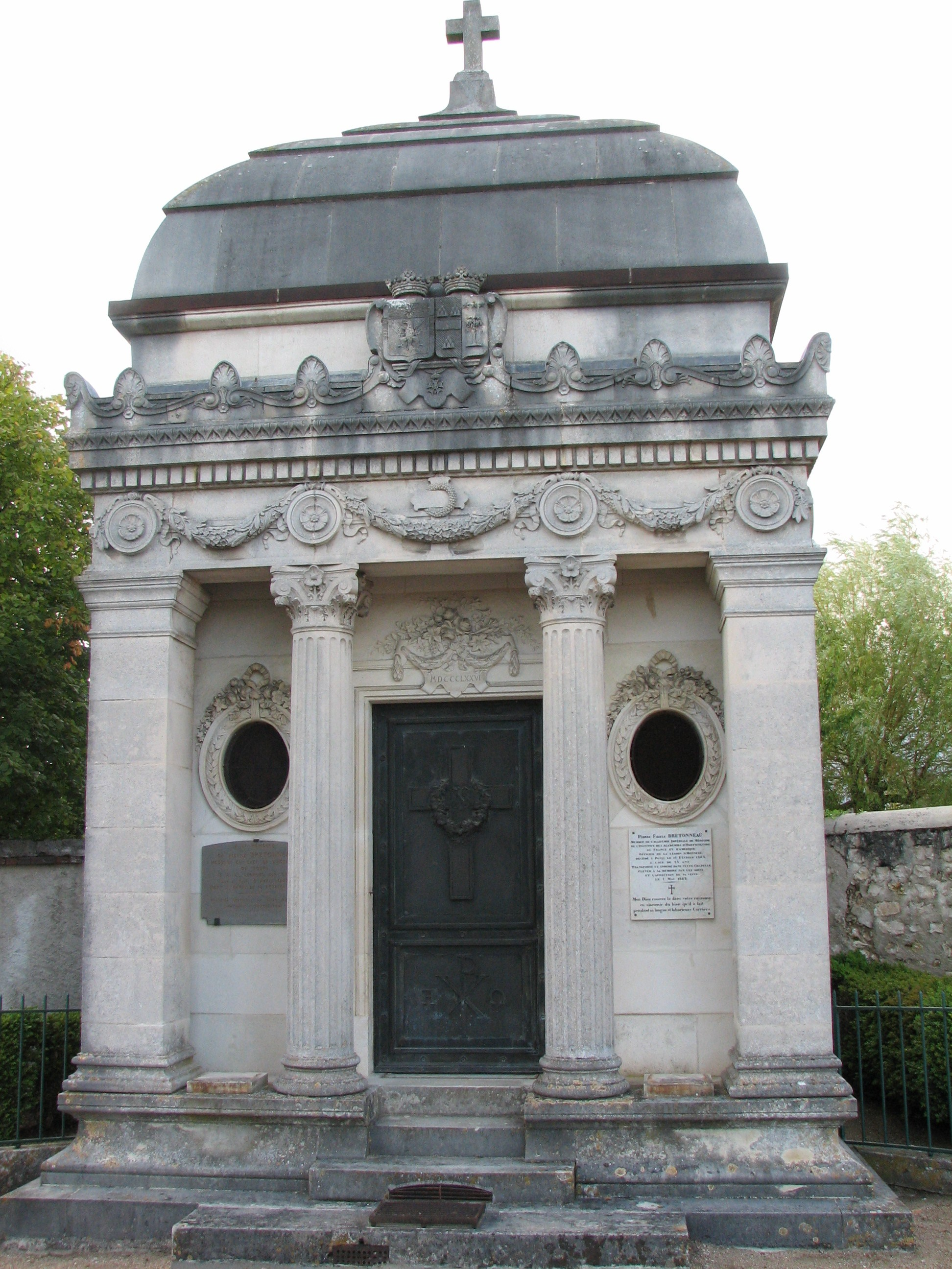 chapelle du docteur Pierre Bretonneau